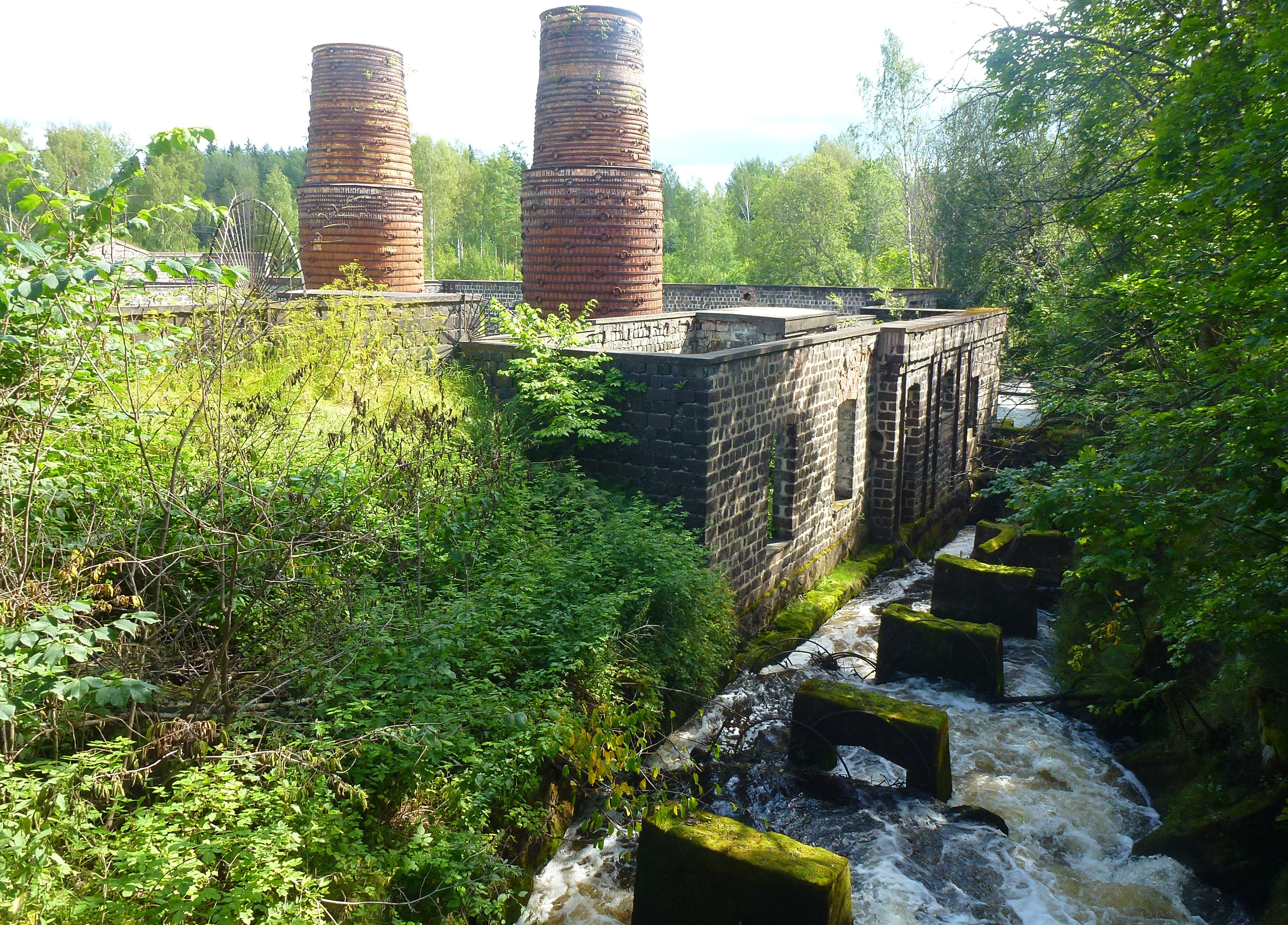 Högfors masugnsruin